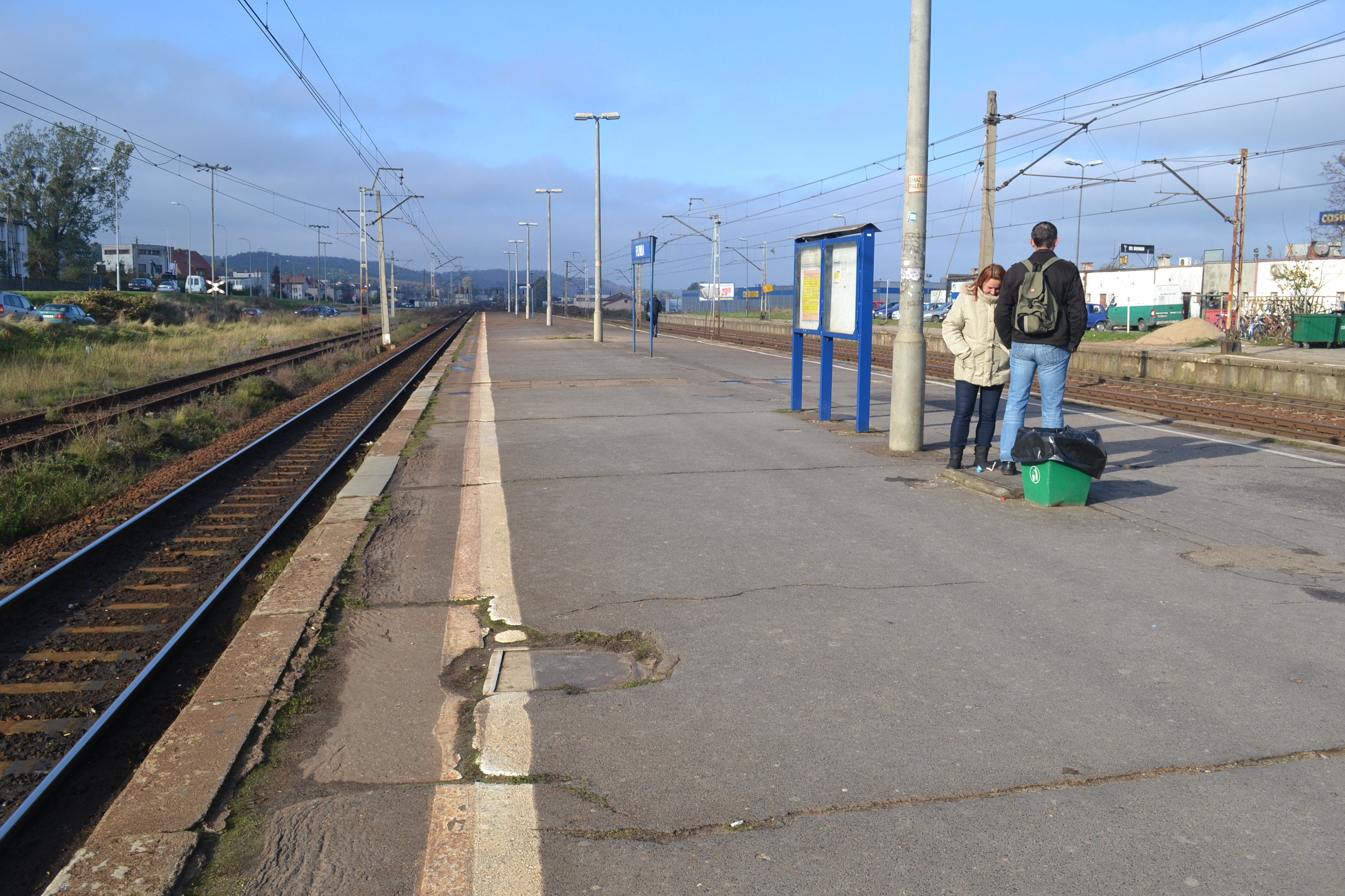 peron w Rumi